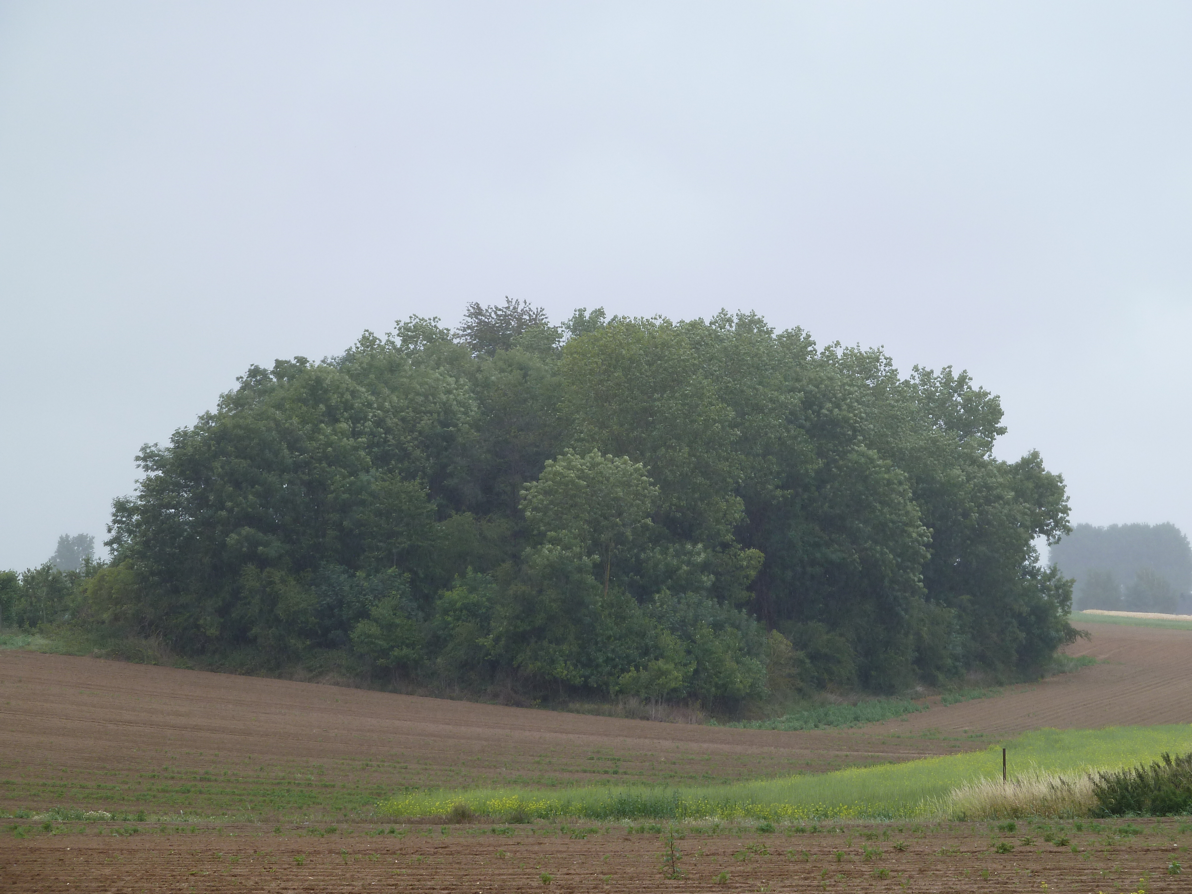 Tumuli de Mirteaux, Wasseiges, Belgique